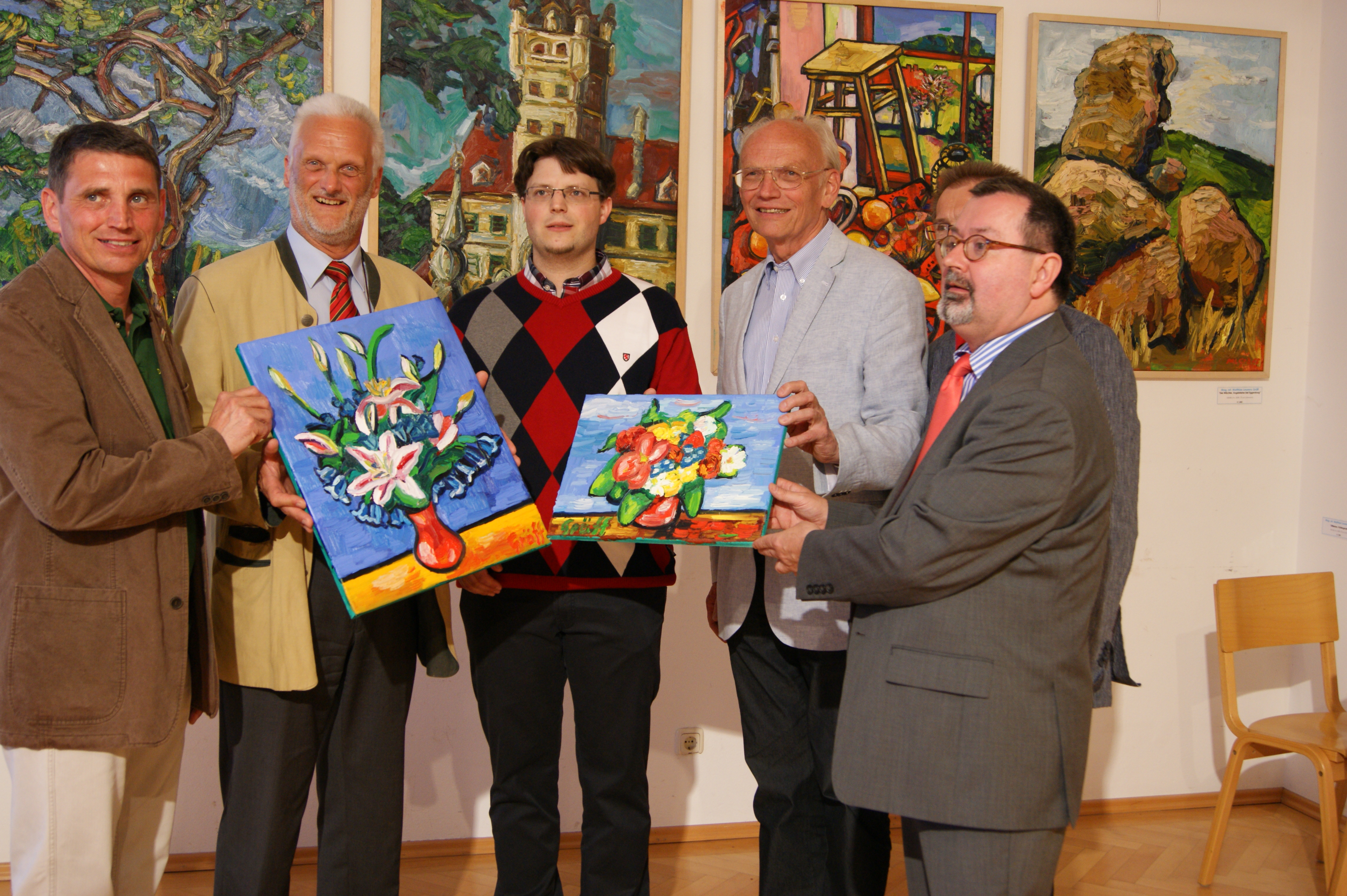 Vzbgm. Günther Kröpfl, Bezirkshauptmann (Zwettl) Dr. Michael Widermann, Mag. Matthias Laurenz Gräff, Nationalrat Dr. Günter Stummvoll, Bürgermeister Ing. Müllner, Museumsleiter Univ-Doz Dr. Friedrich Polleroß (Mai 2012)